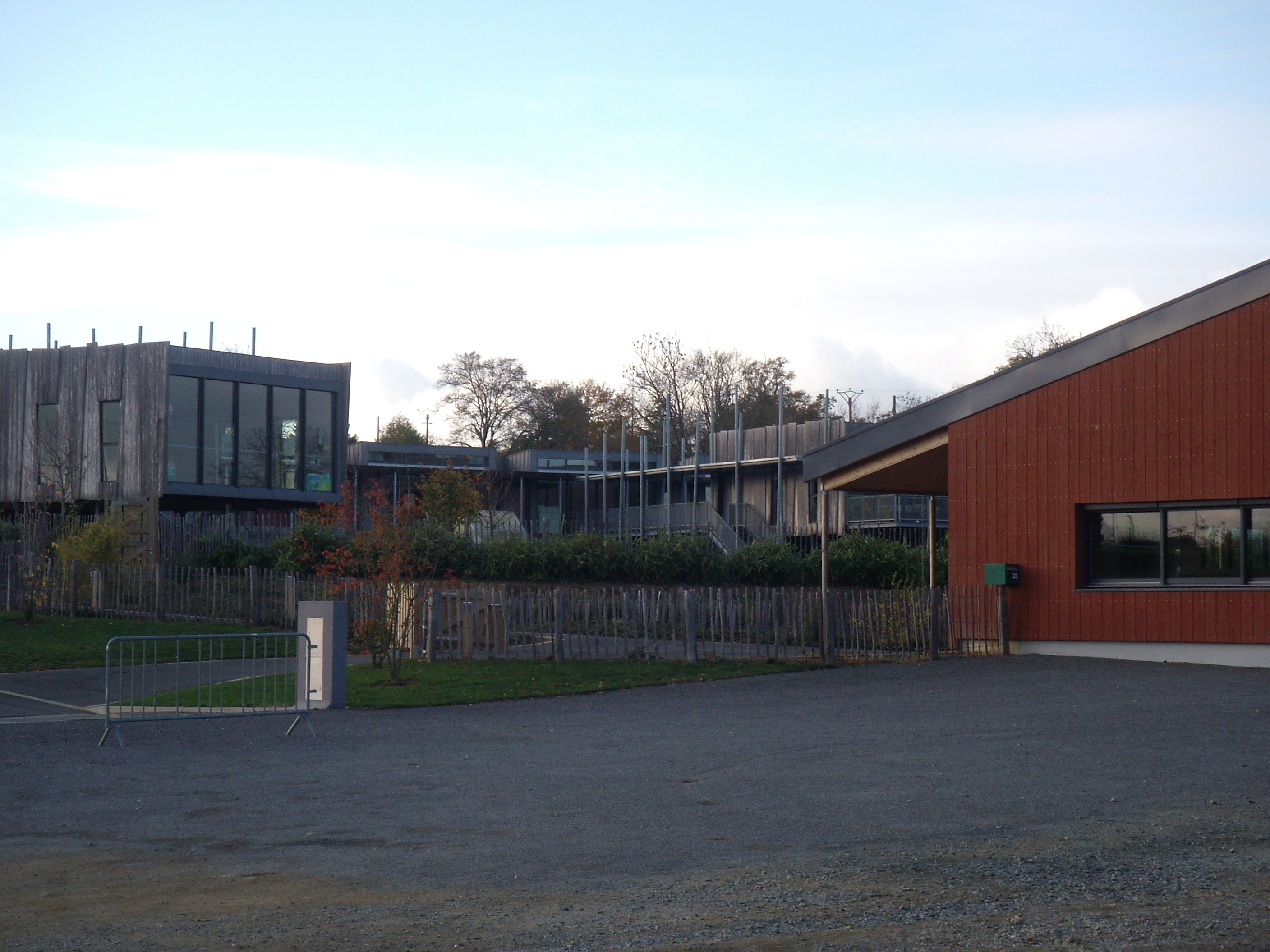 Ecole publique Pierre-et-Marie-Curie à Saint-Germain-sur-Moine